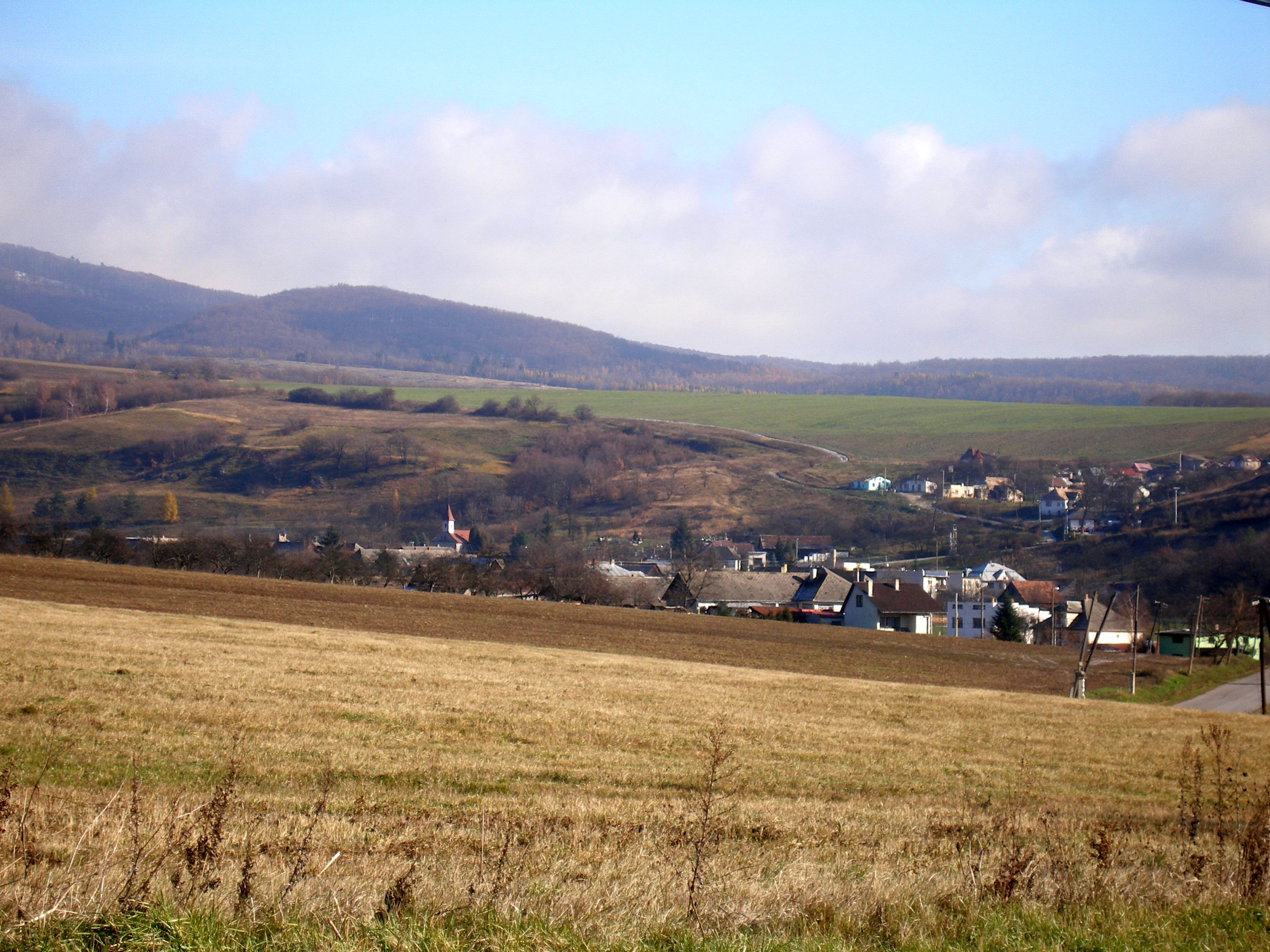 Obec Tuhrina v okrese Prešov